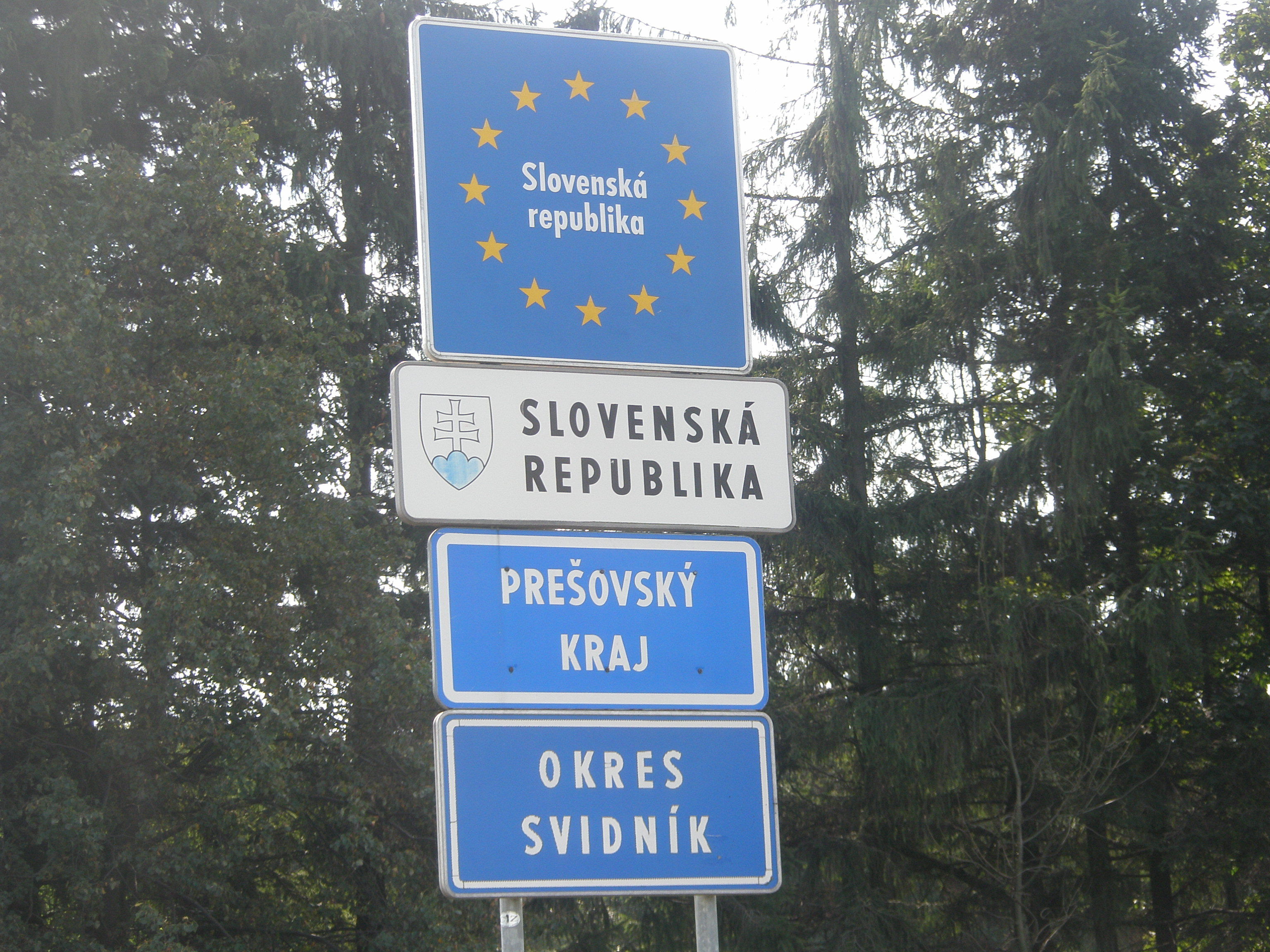 Czeskie tablice informacyjne na przejściu granicznym Barwinek-Vyšný Komárnik, między Polską, a Słowacją przy międzynarodowej trasie E371